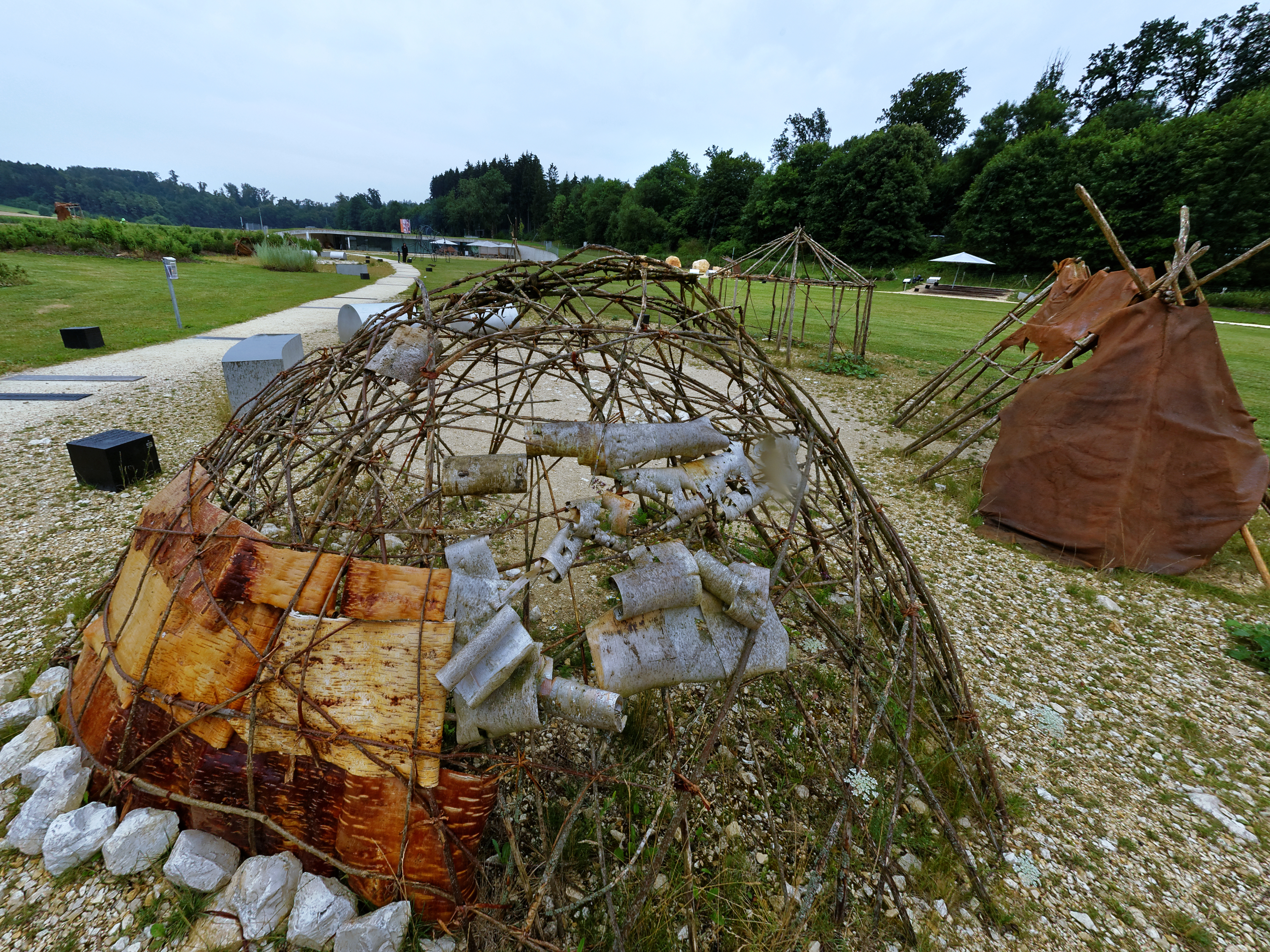 Der Archäopark Vogelherd an der Vogelherdhöhle auf der Schwäbischen Alb.